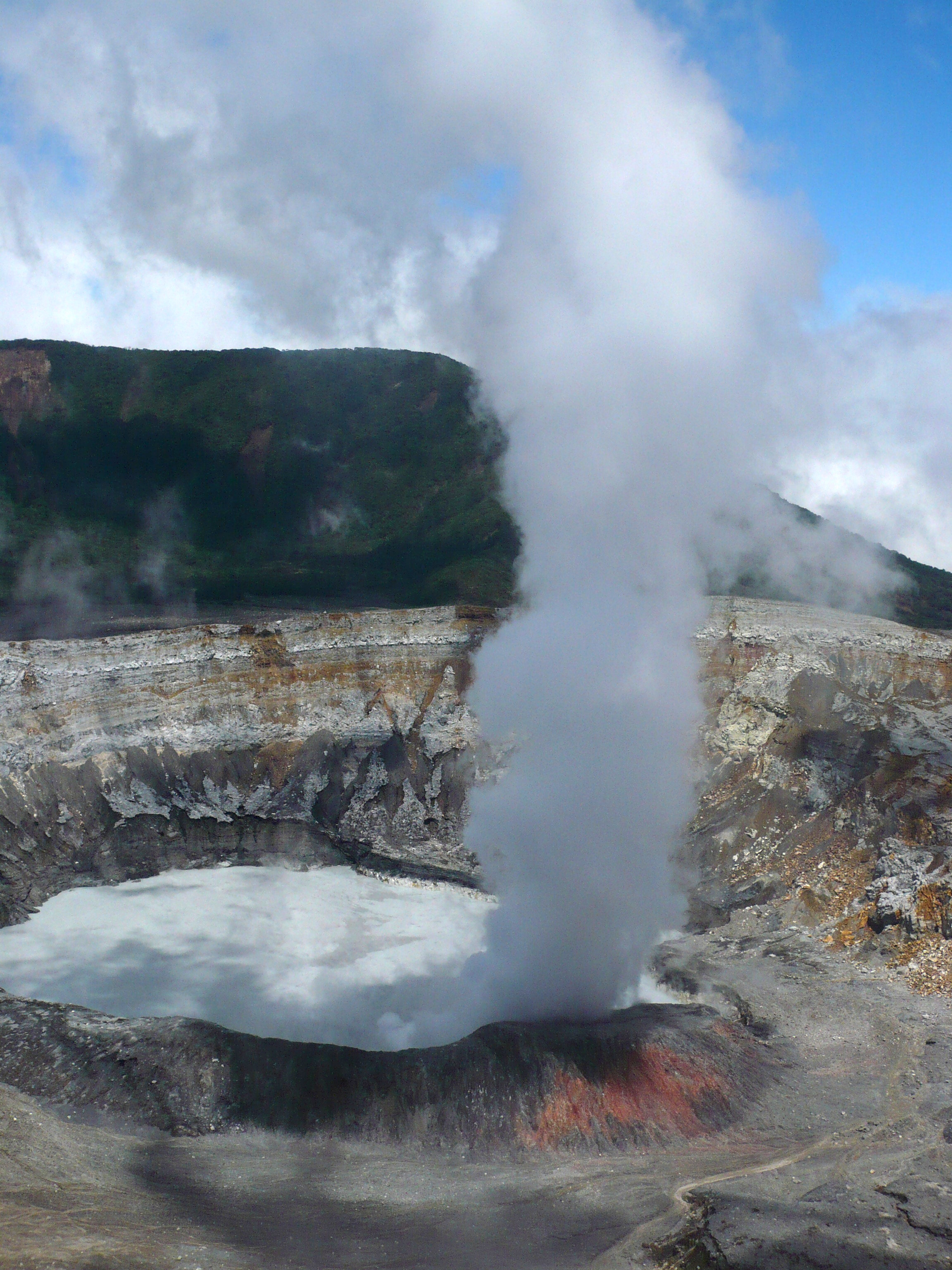 Foto tomada desde el mirador del cráter principal del Parque Nacional Volcán Poás, Alajuela, Costa Rica